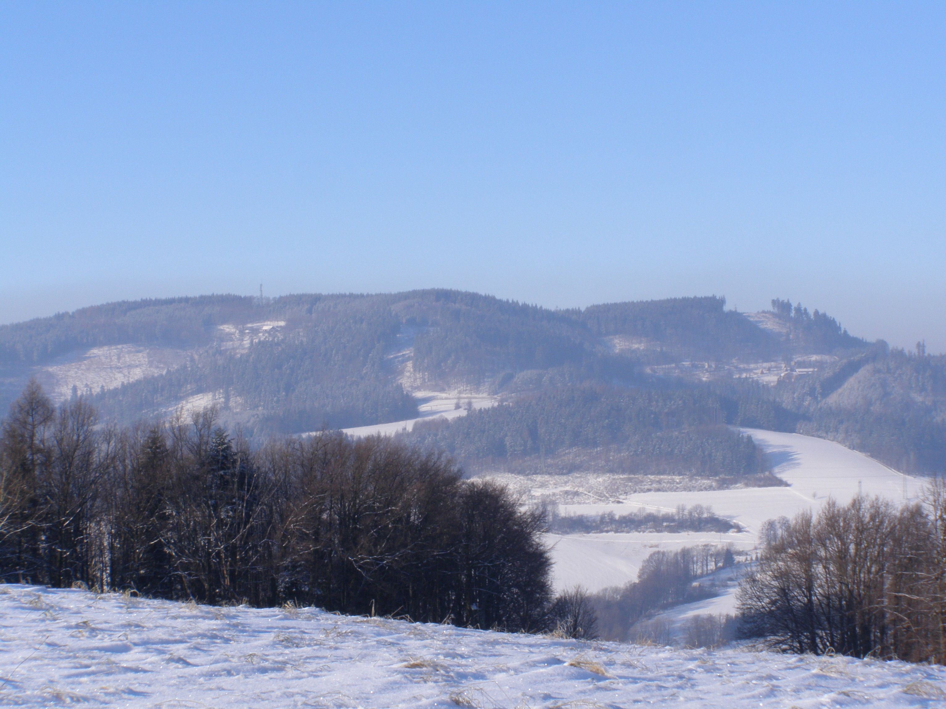 Česky: Metylovická pahorkatina, výhled z vrcholu Na Magoni (497 m) na severozápad: Palkovické hůrky, vlevo vrchol Kubánkov (660 m), vpravo vrchol Holý vrch (631 m)